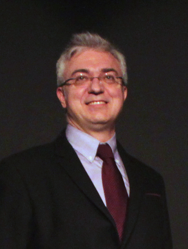 Profesor Kazuhiro Nogami de la Tokyo Metropolitan University. 野上和裕、首都大学東京・社会科学研究科法学政治学専攻 都市教養学部法学系教授（西洋政治史専攻） Javier Moreno Luzón, profesor e investigador de la Universidad Complutense de Madrid. マドリード・コンプルテンセ大学のハビエル・モレノ・ルソン教授 Gonzalo de Benito, embajador de España en Japón. ゴンサロ・デ・ベニト、スペイン大使 Antonio Gil de Carrasco, director del Instituto Cervantes de Tokio. アントニオ・ヒル・デ・カラスコ 、 セルバンテス文化センター東京 館長